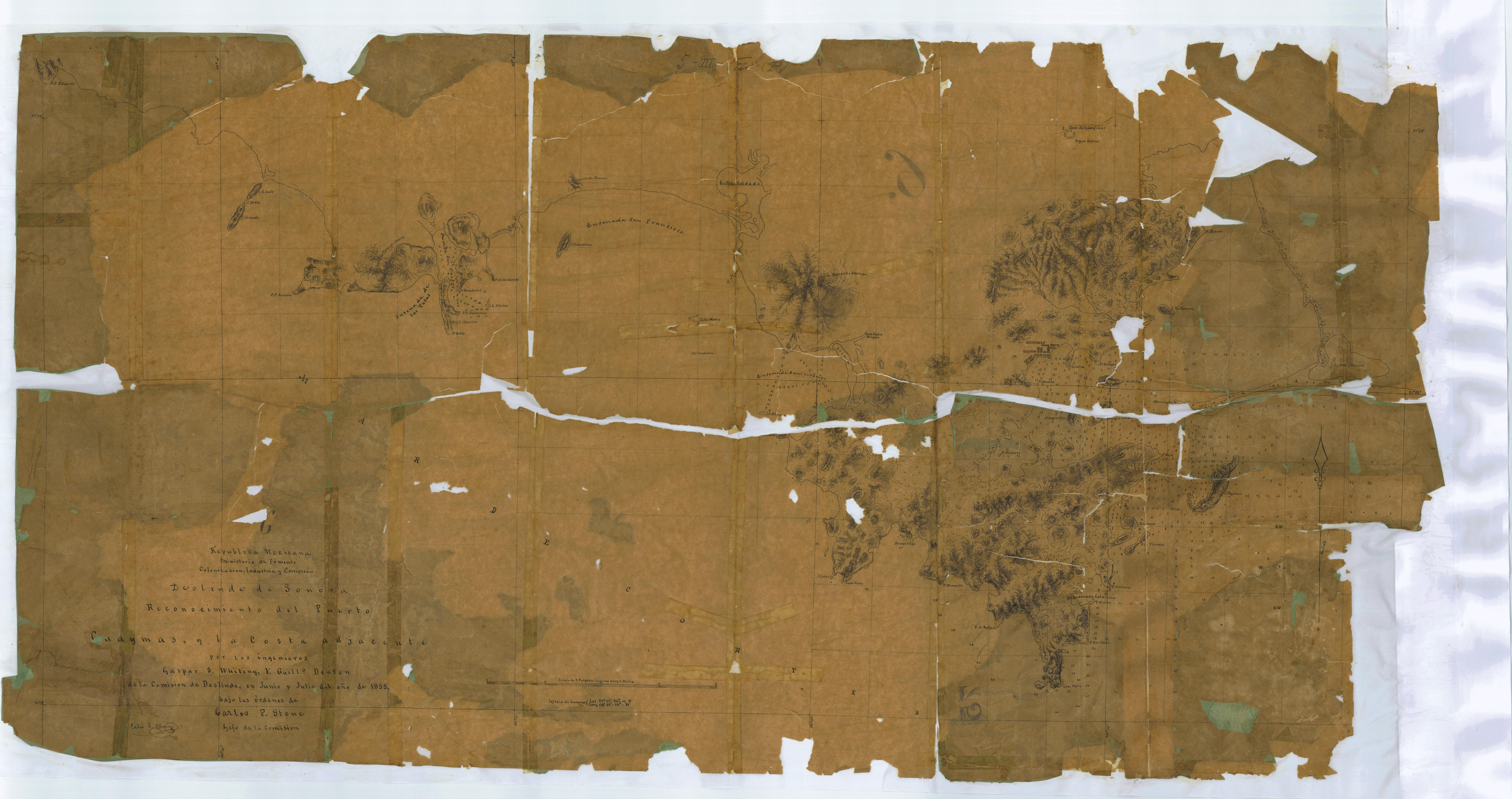 Bahia de Guaymas en 1858 por la Comision de Deslinda de Sonora, a cargo e Charles P. Stone